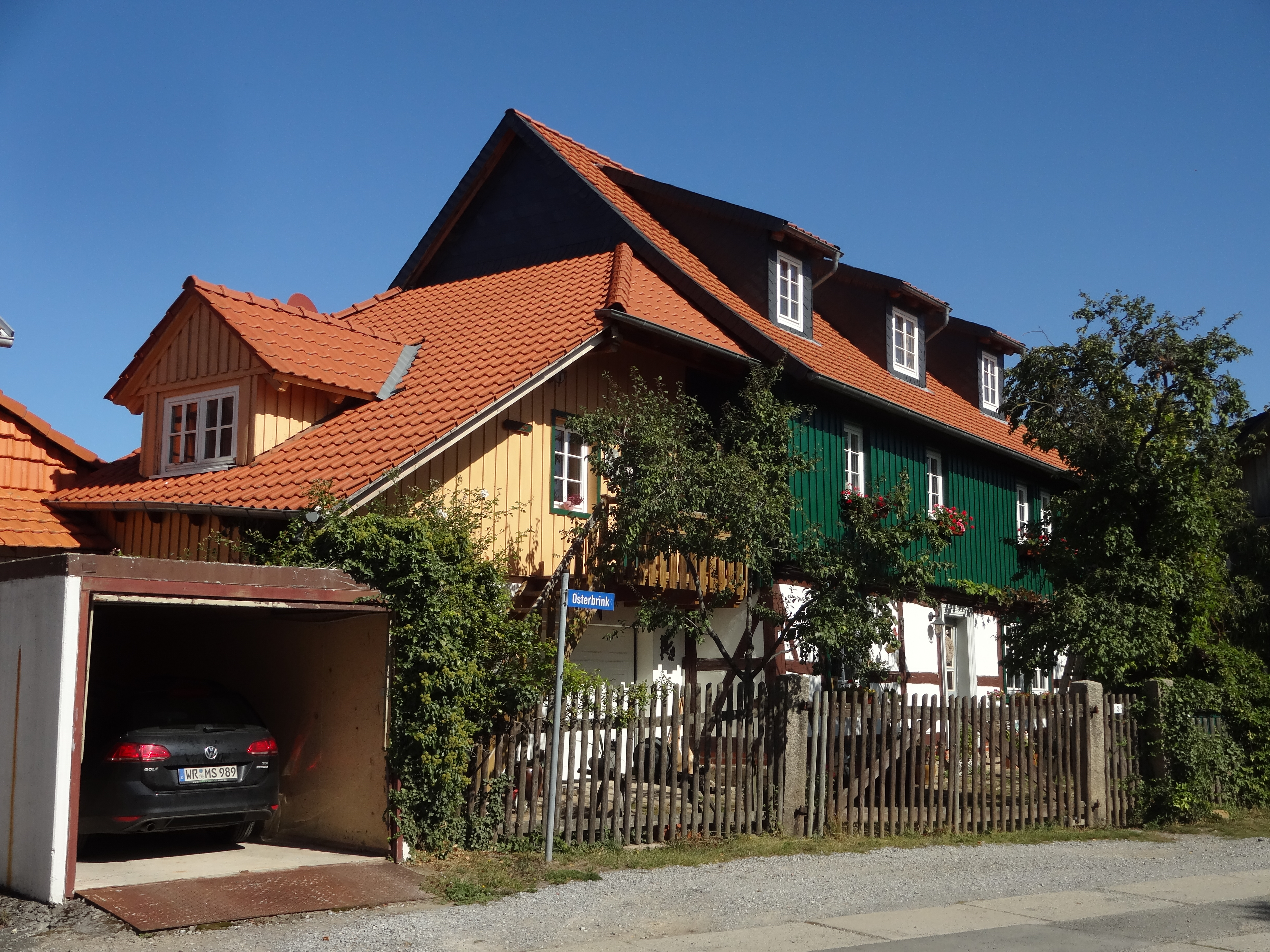 denkmalgeschütztes Bauernhaus in der Straße Osterbrink 3 in Drübeck